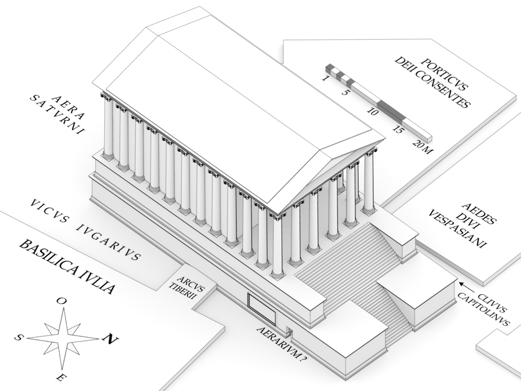 Restitution du temple de Saturne D'après : - Richardson, The Approach to the Temple of Saturn in Rome, AJA, 1980 - Pensabene, Tempio di Saturno, 1984 - Richardson, A New Topographical Dictionary of Ancient Rome, 1992 - Stamper, The architecture of roman temples, 2005 Perspective isométrique Voir aussi